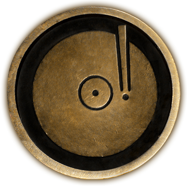 Symbol der Kategorie Musik (recording) der Sterne auf dem Hollywood Walk of Fame.